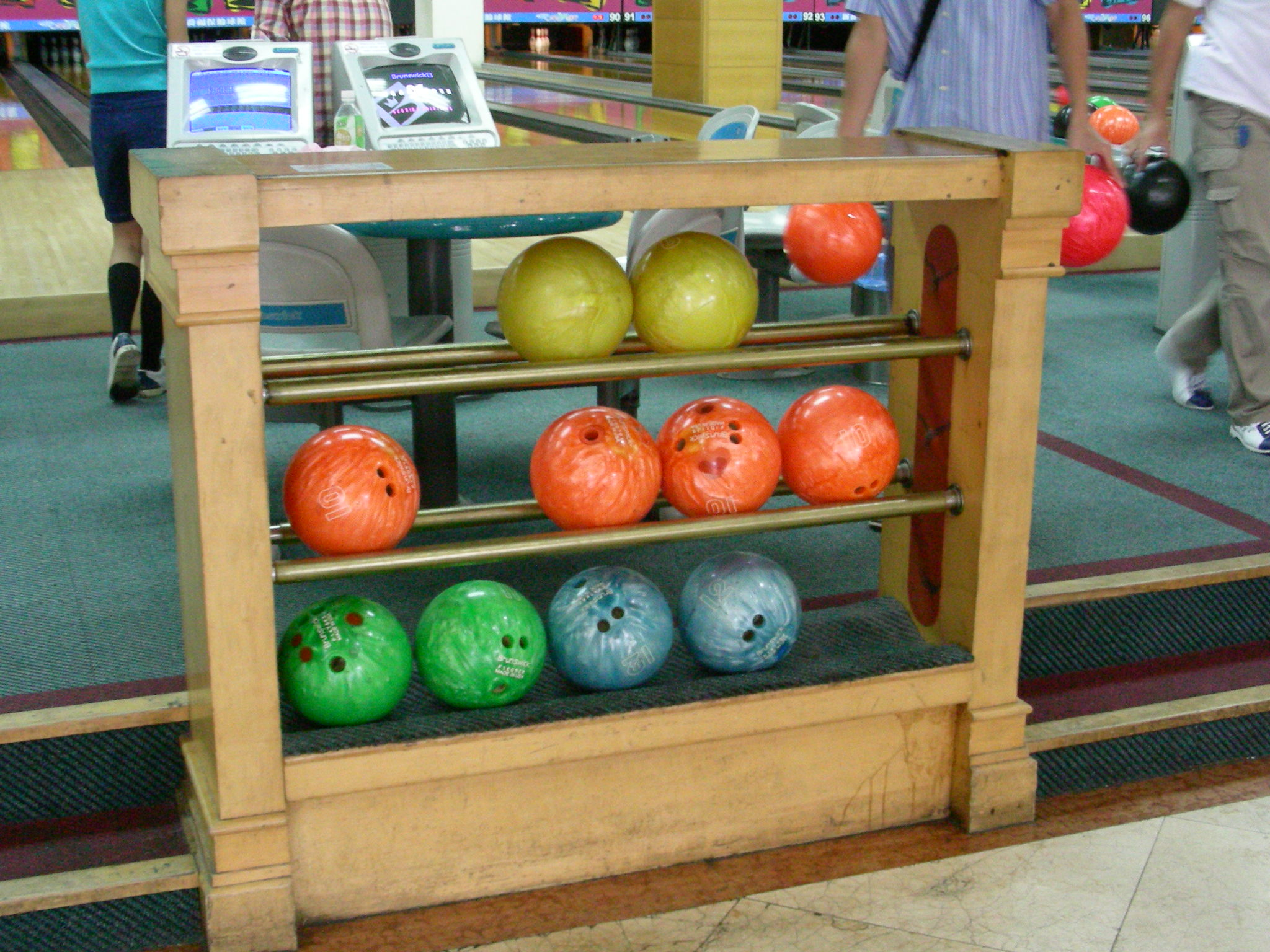 中文（台灣）: 臺北縣中和市新喬福保齡球館提供的公用球